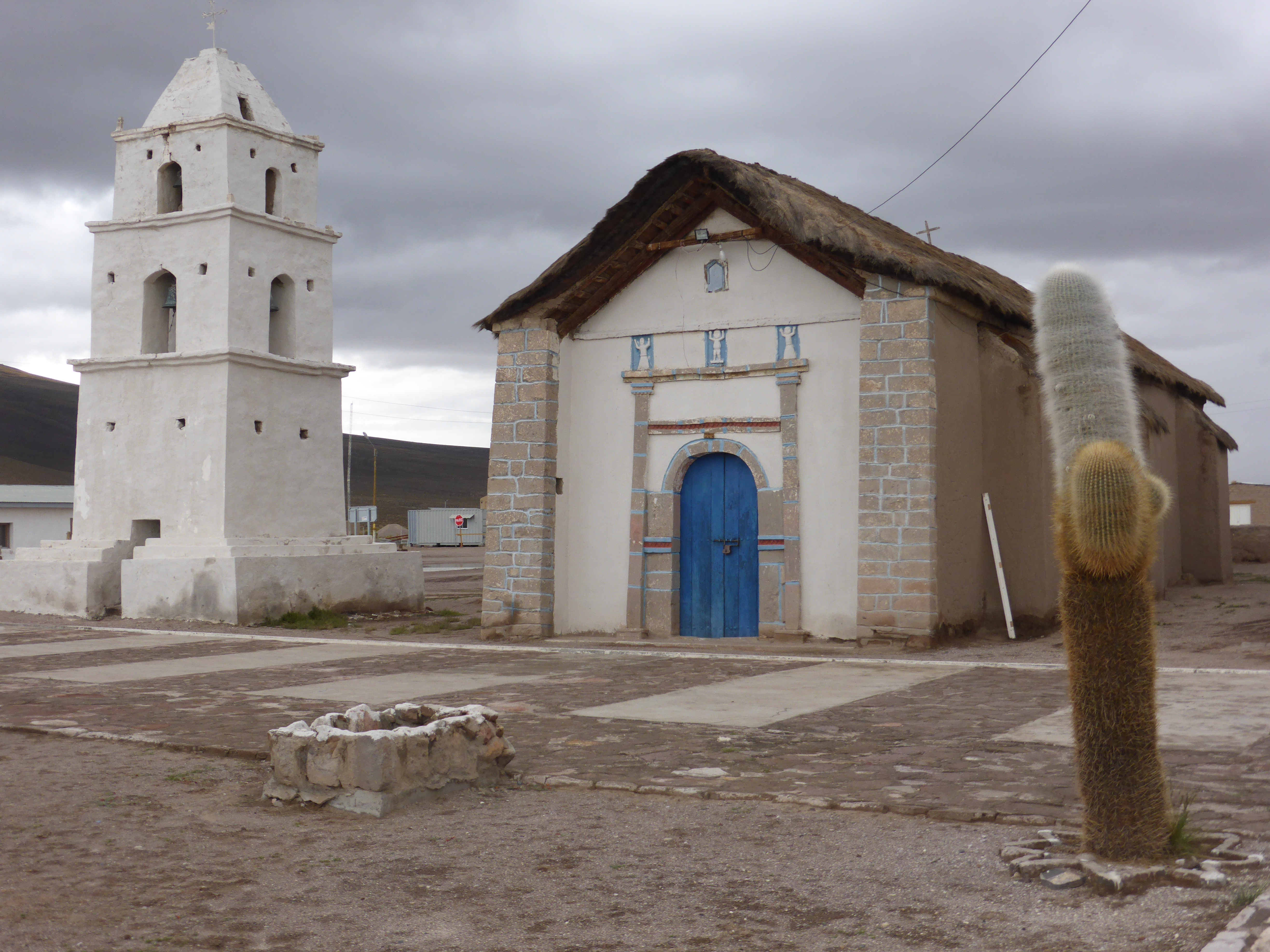 Iglesia de Cariquima, declarada monumento histórico de Chile. Comuna de Colchane, Provincia del Tamarugal, Región de Tarapacá. Comunidades indígenas aymaras.